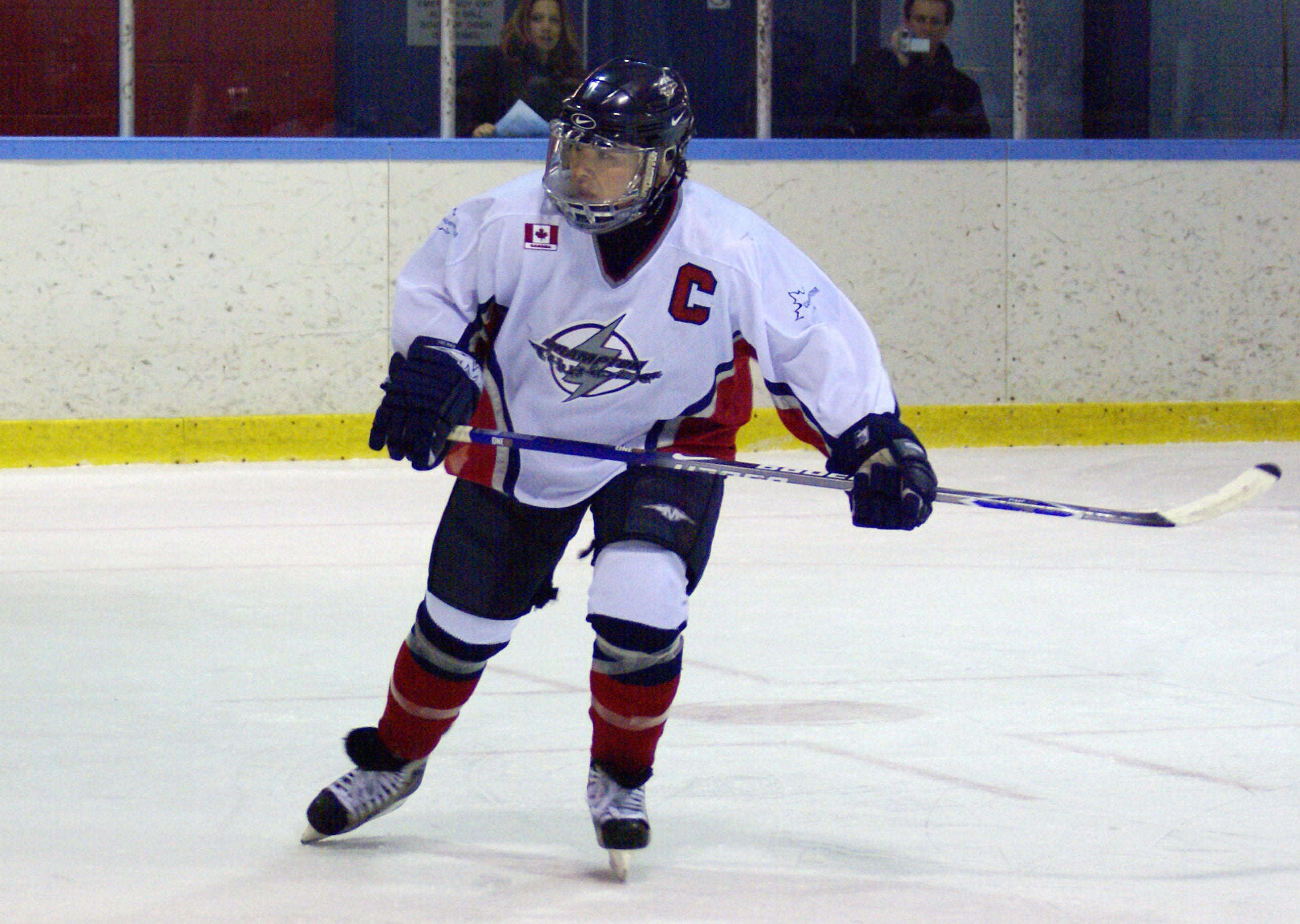 Vicky Sunohara